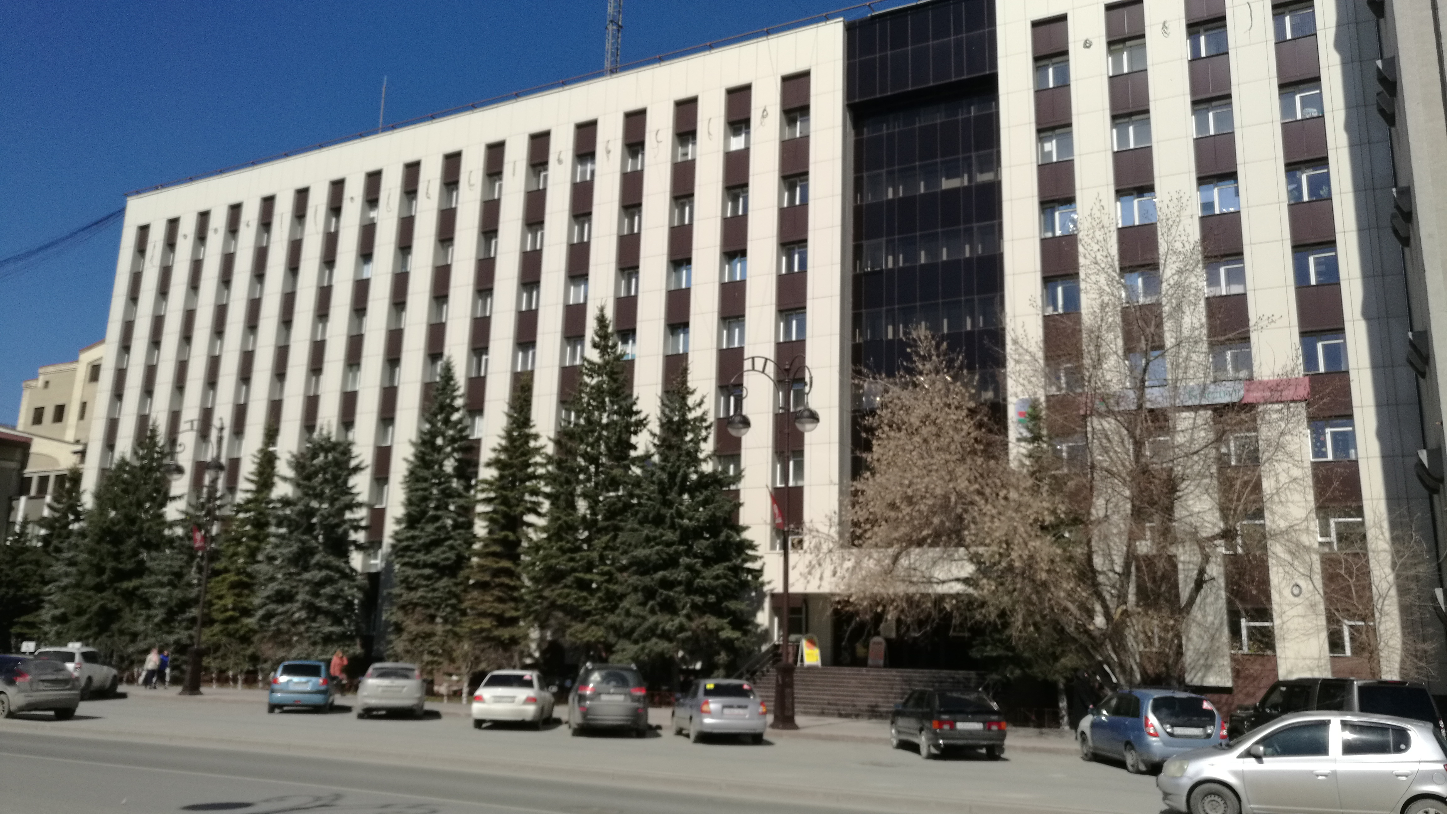 Strato Respubliko. Tjumeno, Rusio.